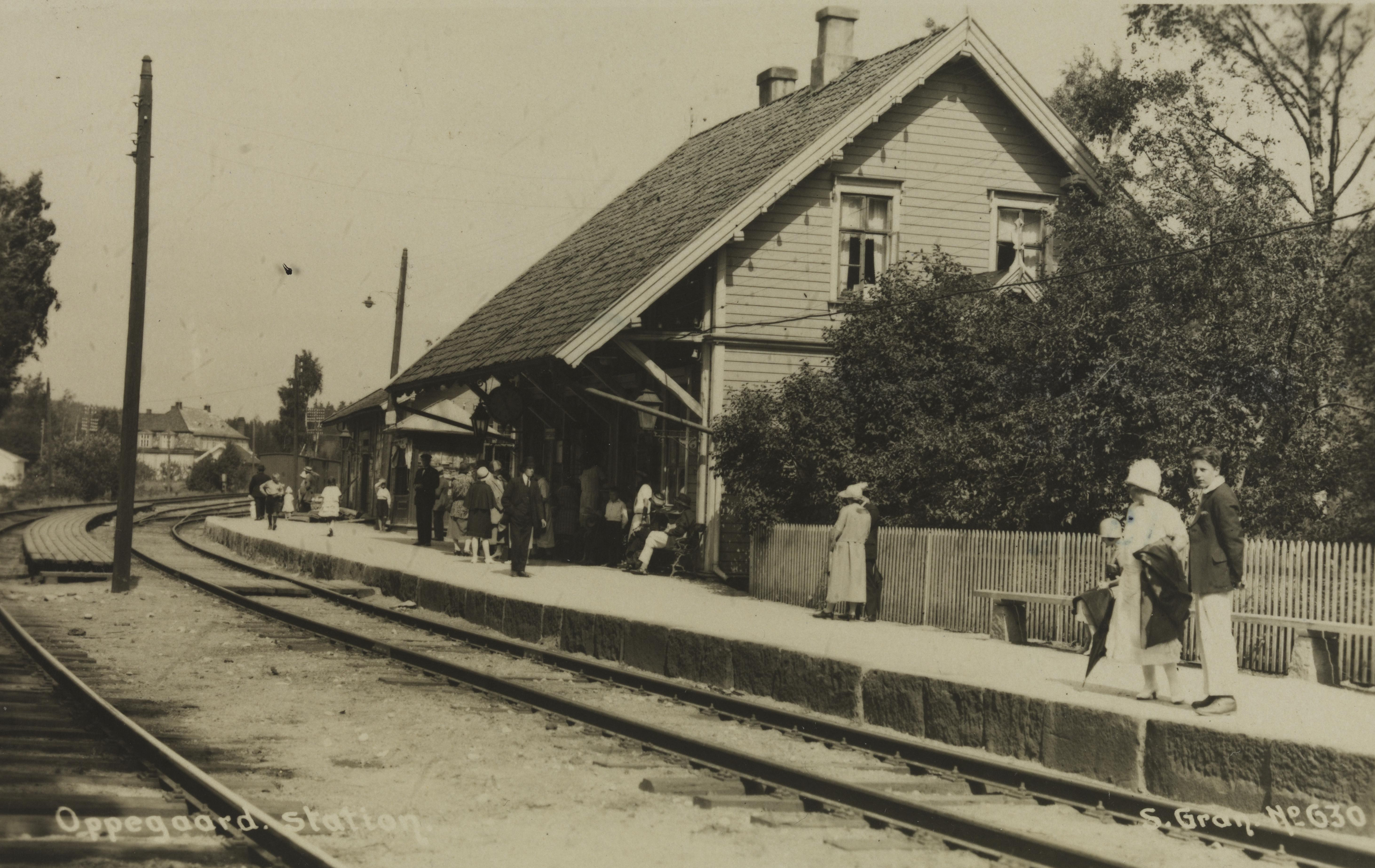 Bildet er hentet fra Nasjonalbibliotekets bildesamling Oppegård stasjon, Oppegård, Akershus